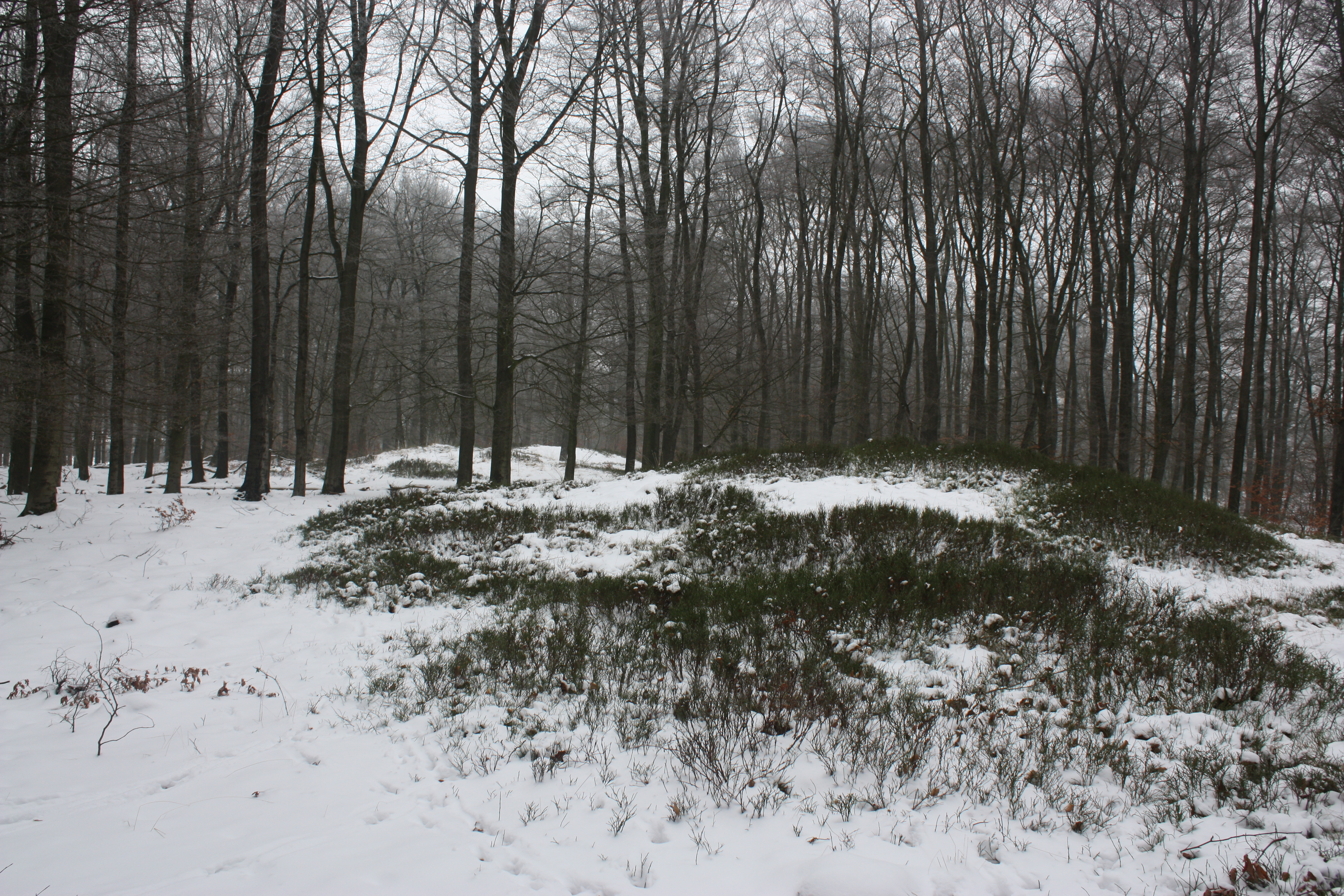 Terrein met drie grafheuvels. Op deze foto zijn de grafheuvels alle drie te zien.